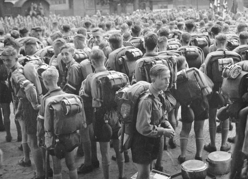 1250, Hitler-Jungen fahren ins Sommerlager Der erste Start in den Ferien. Es geht nach dem Bodensee.